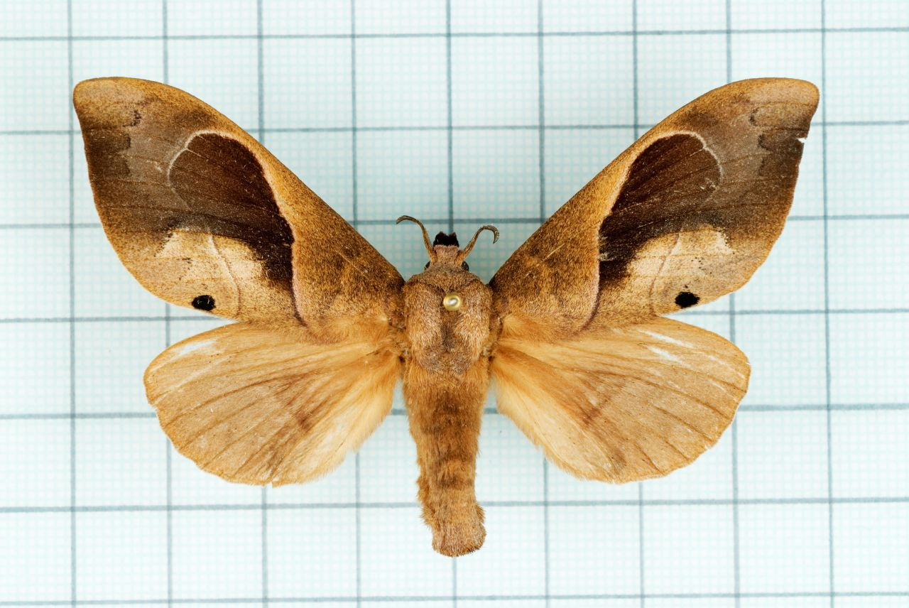 Paralebeda femorata mirabilis (Zolotuhin, 1995) 大褐斑枯葉蛾 認識台灣的昆蟲 20 P.250 male